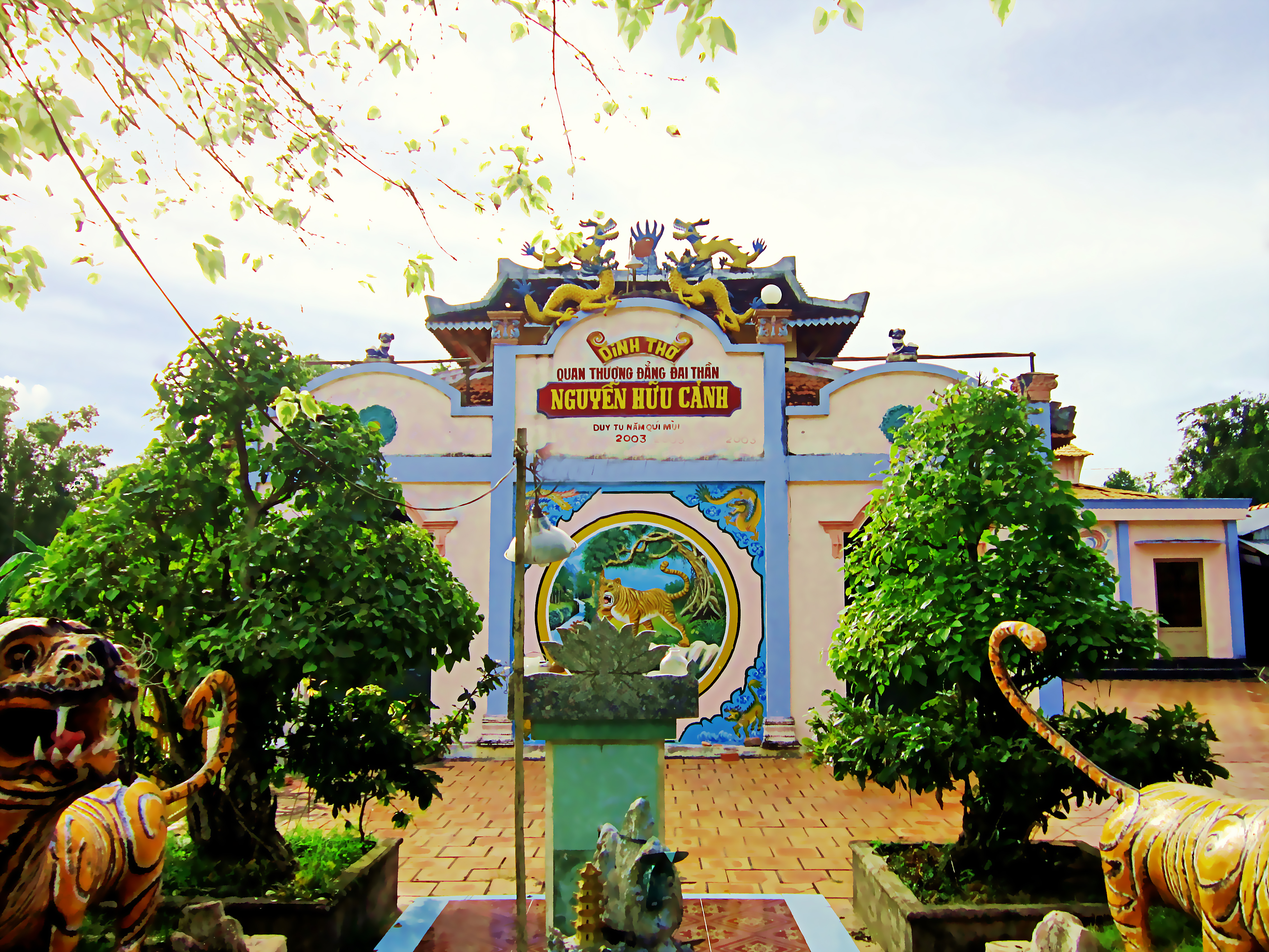 Dinh thờ Nguyễn Hữu Cảnh (1650-1700) ở xã An Thạnh Trung, thuộc thị trấn Chợ Mới, An Giang, Việt Nam. Ông được xem là người đã xác lập chủ quyền cho người Việt tại vùng đất Nam Bộ vào cuối thế kỷ 17.